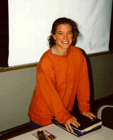 Cristina Masoller durante su defensa del Ph.D.